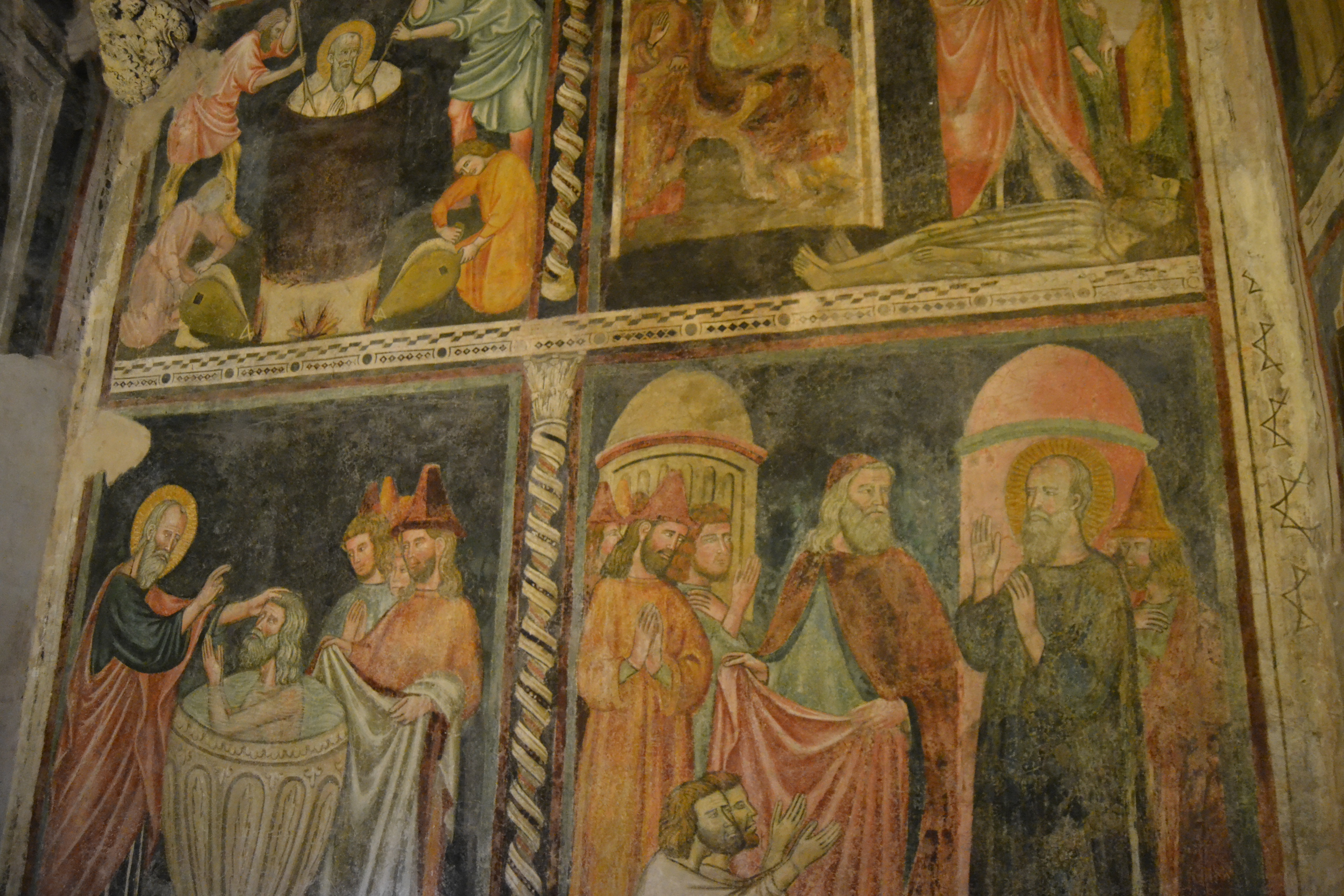 Cappella Loffredo (Chiesa di Santa Maria Donnaregina Vecchia, Napoli) Particolare di un ciclo di affreschi trecenteschi nella controfacciata